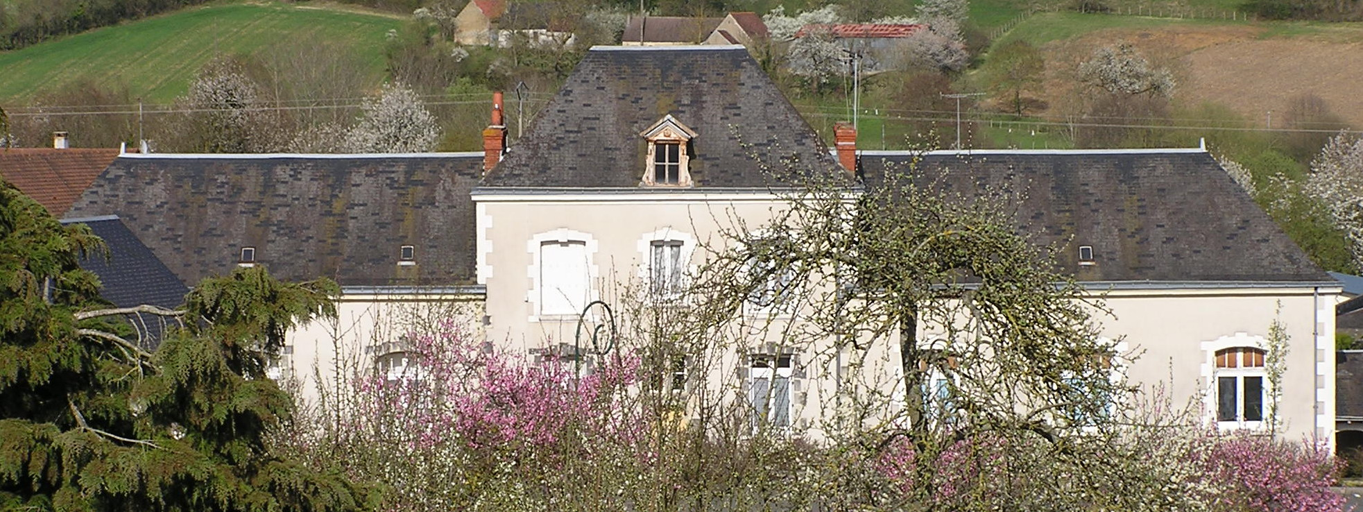 Ecole de la Chapelle-Huon (72)